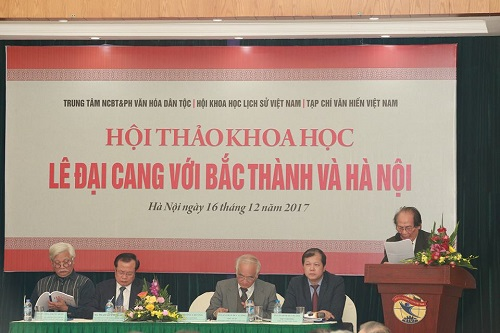 Sáng nay (16/12), tại Hà Nội Hội Khoa học lịch sử Việt Nam, Trung Tâm nghiên cứu bảo tồn & Phát huy Văn hóa Dân tộc, Tạp chí Văn hiến Việt Nam tổ chức Hội thảo: “Lê Đại Cang với Bắc thành và Hà Nội”.